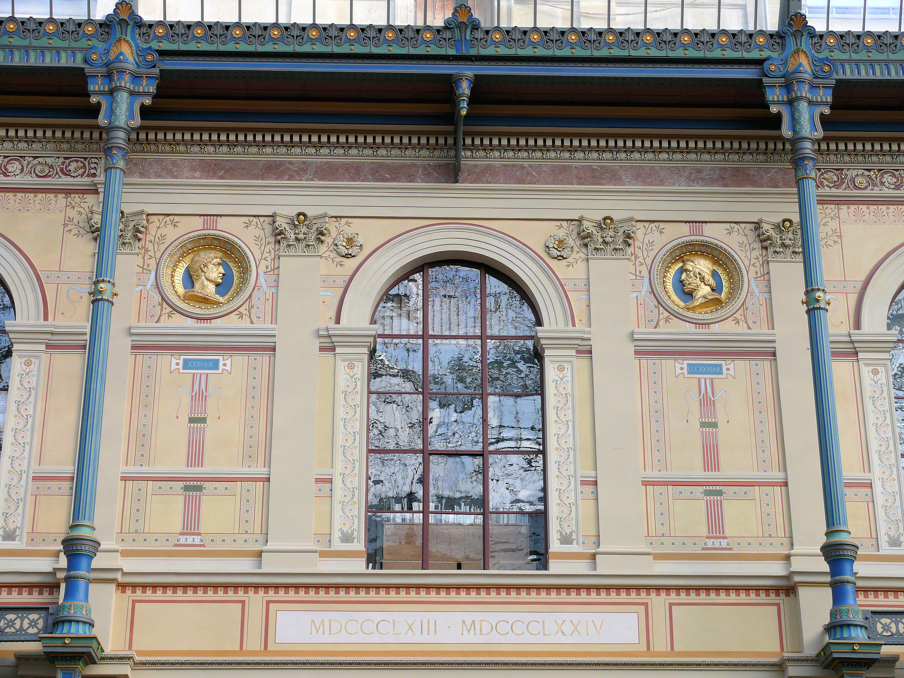 Ecole des Beaux-Arts - Palais des Etudes - Cour vitrée